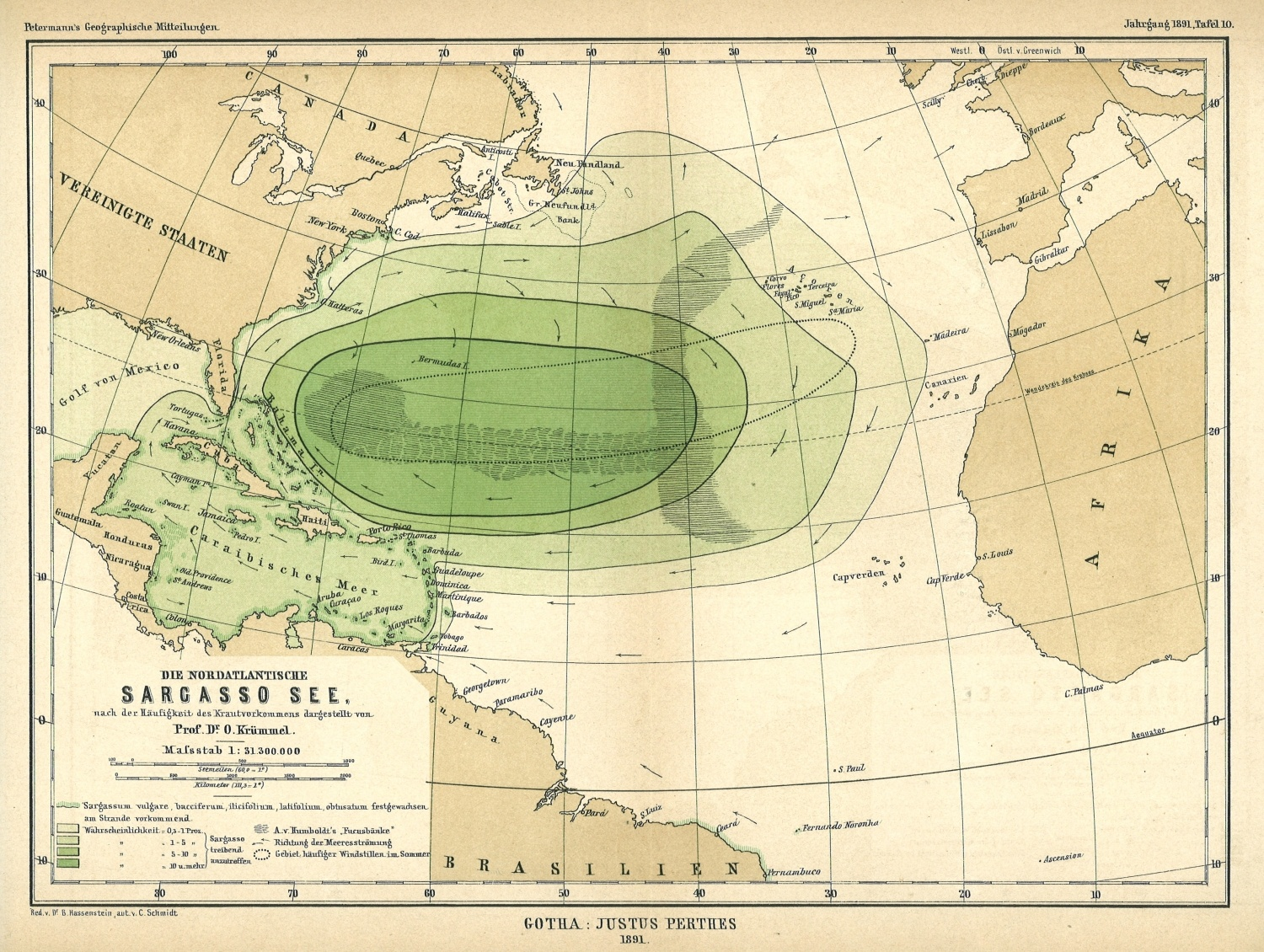 La mer des Sargasses dans l'Atlantique nord, Cartographiée d'après Otto Krümmel (1854-1912).- Die nordatlantische Sargasso See (1891), Petermanns geographische Mitteilungen (1891), Dr. A. Petermann's Mitteilungen aus Justus Perthes' geographischer Anstalt (1891), Justus Perthes Editeur, Gotha, 1891.